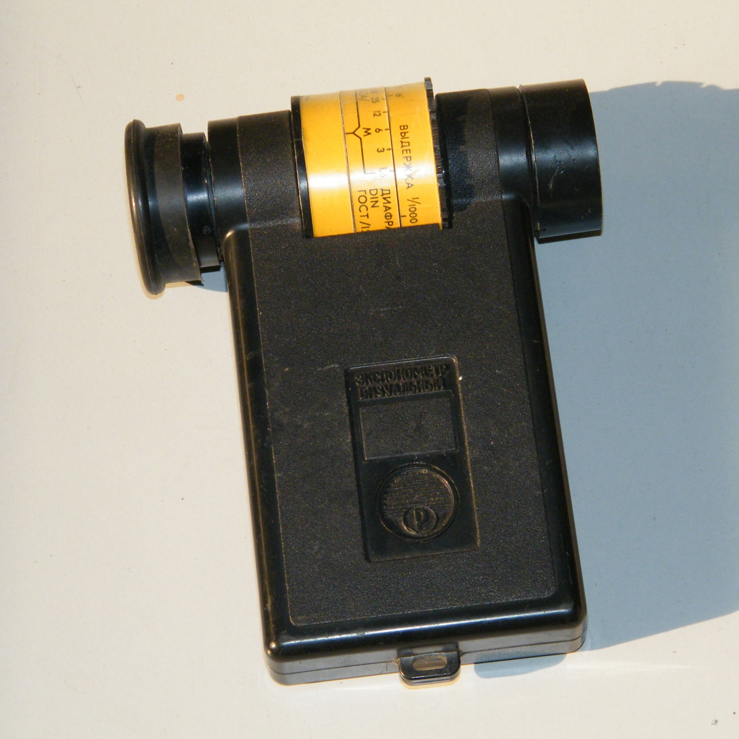 Экспонометр визуальный - сравнение яркости изображения в видоискателе с эталонной лампой